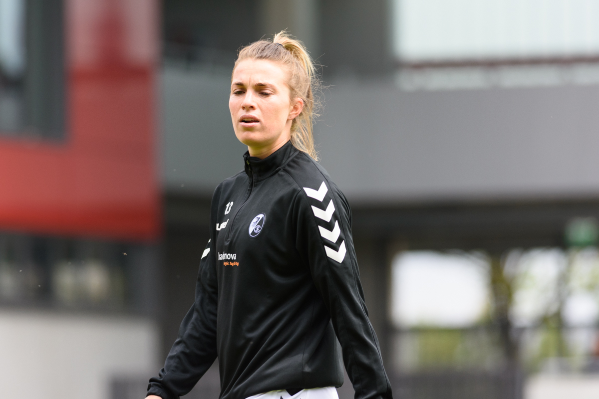 Sandra Starke during FC Bayern (women) SC Freiburg (women), May 2019